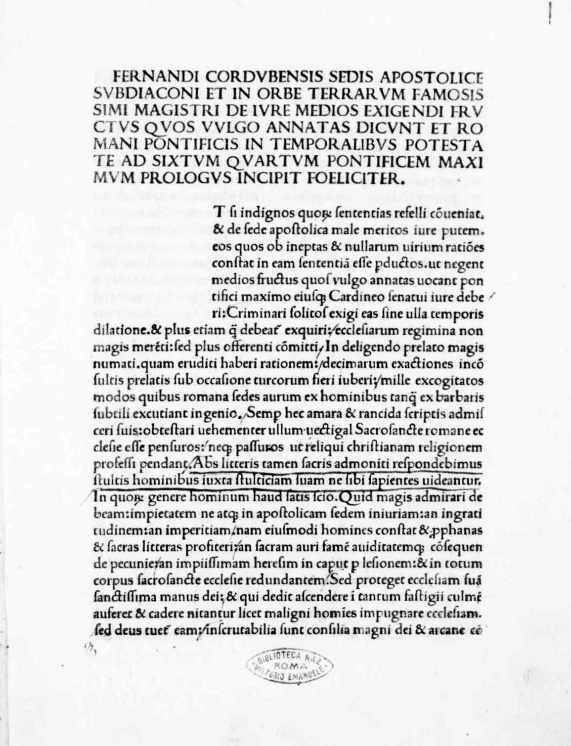 Carta a3r